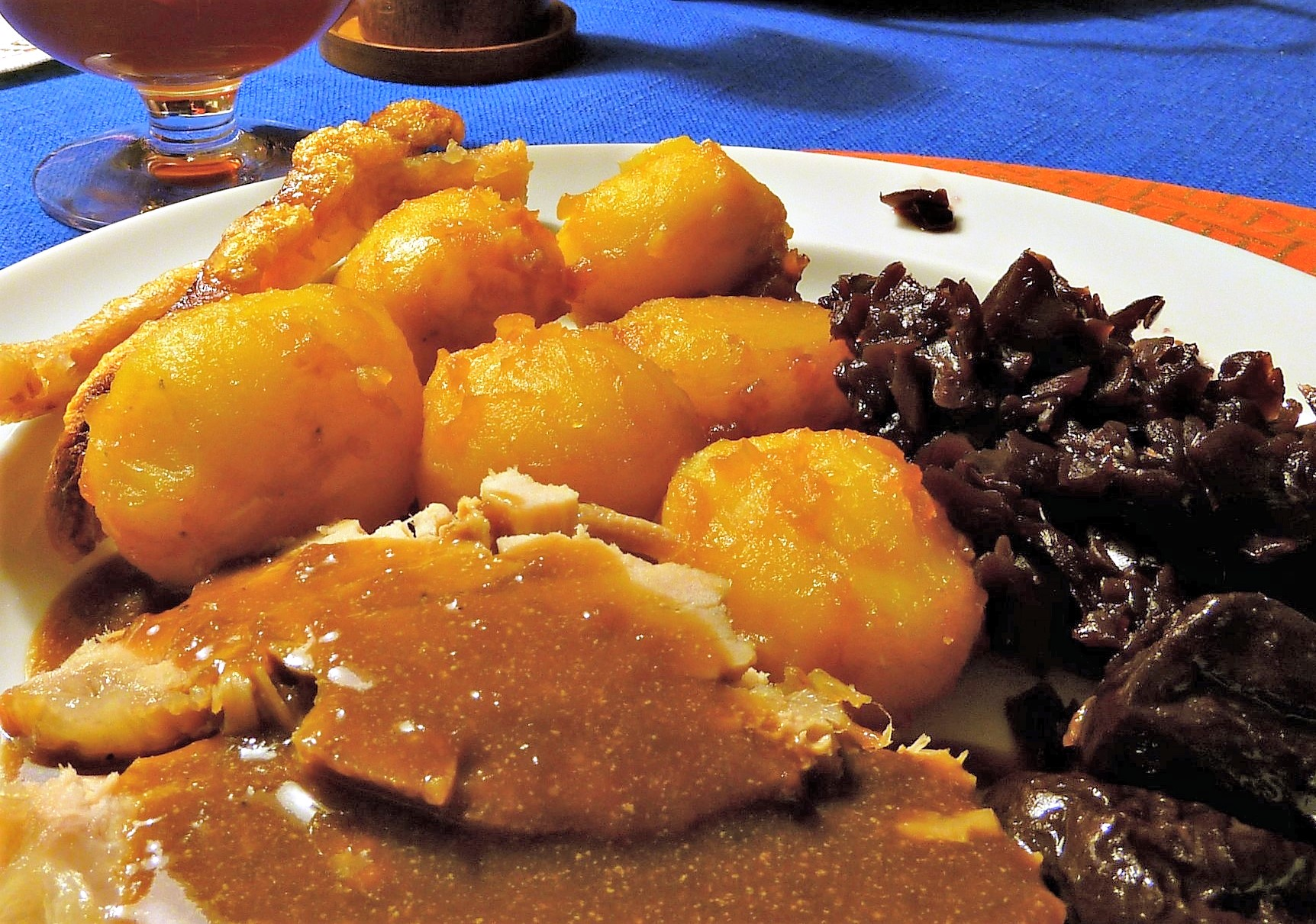 Typisches Weihnachtsessen in Dänemark: Schweinebraten mit Schwarte (dänisch: Flæskesteg), karamellisierte Kartoffeln (Brunede kartofler), braune Soße und Rotkohl (Rödkål).